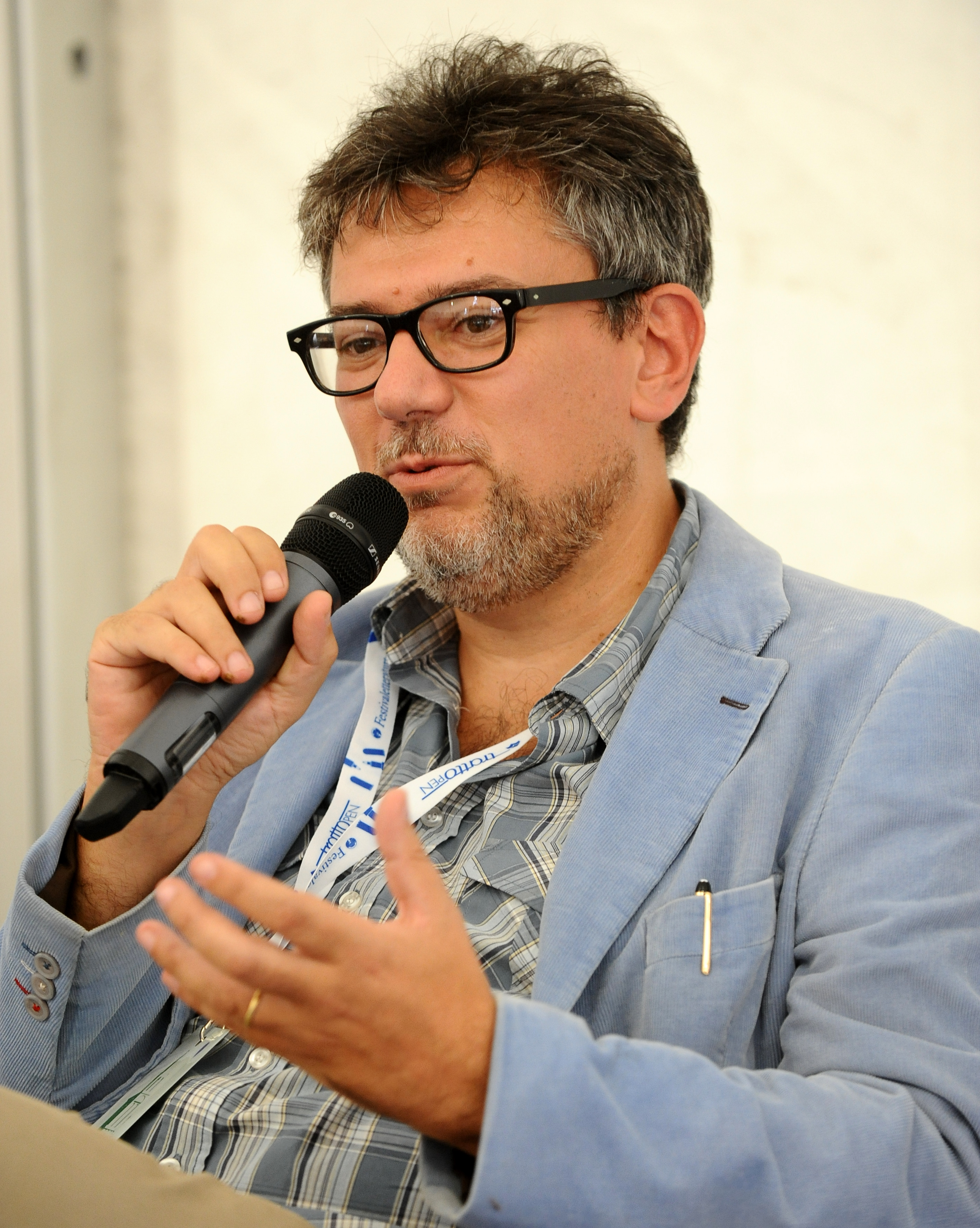 Tito Faraci a Mantova per il Festivaletteratura 2012.